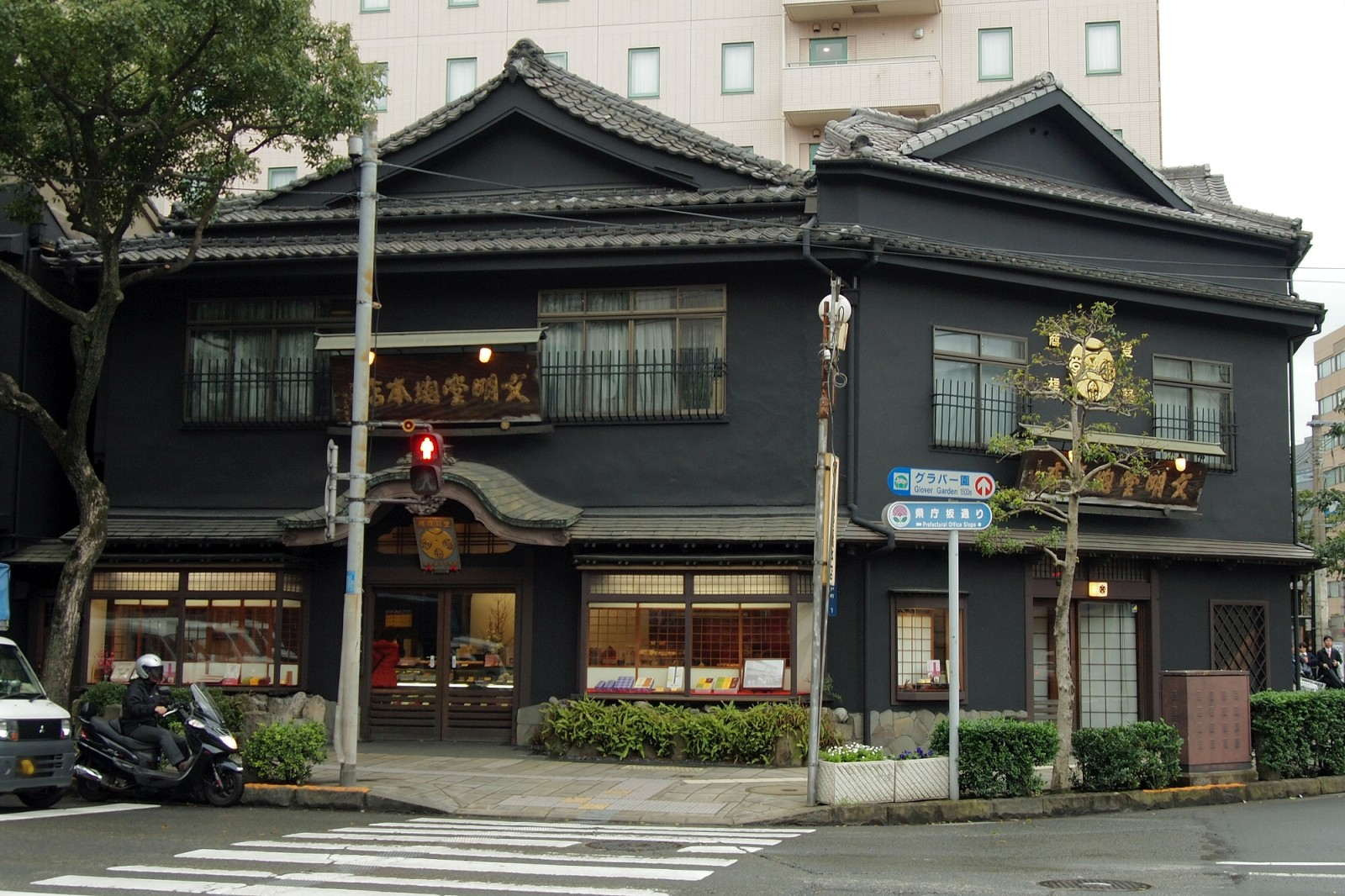 長崎県長崎市にある文明堂総本店